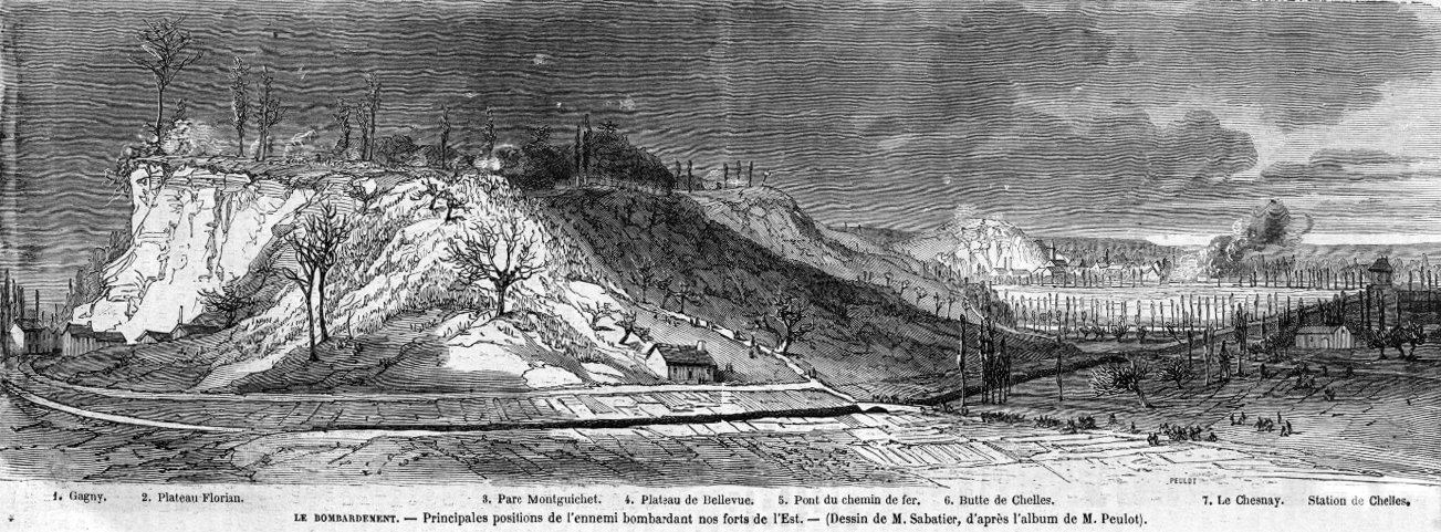 Dessin d'une vue panoramique : principales positions de l'ennemie bombardant nos forts de l'Est. A droite la station de Chelles.